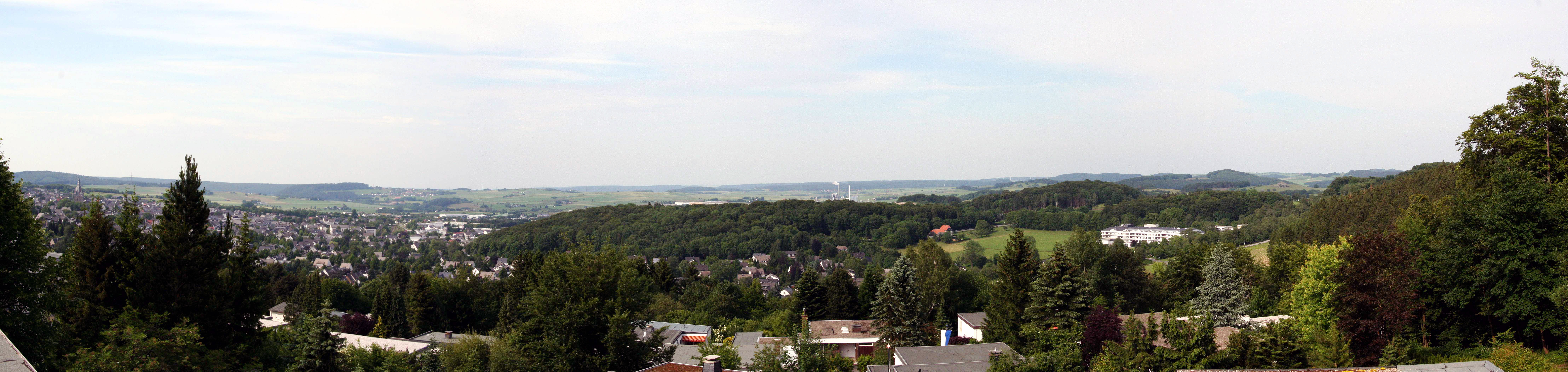 Panorama der Stadt Brilon vom Itzelstein aus